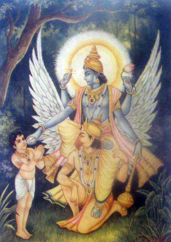 Vishnu and Bhakta Dhruva - 1940's Vintage Prints